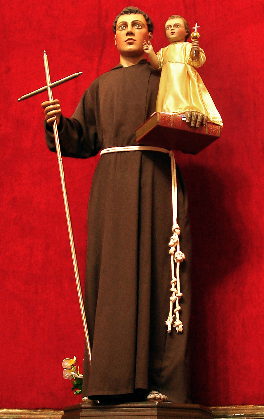 Santo Antônio e o Menino, no interior da Igreja de Santo Antônio, Porto Alegre, Brasil.